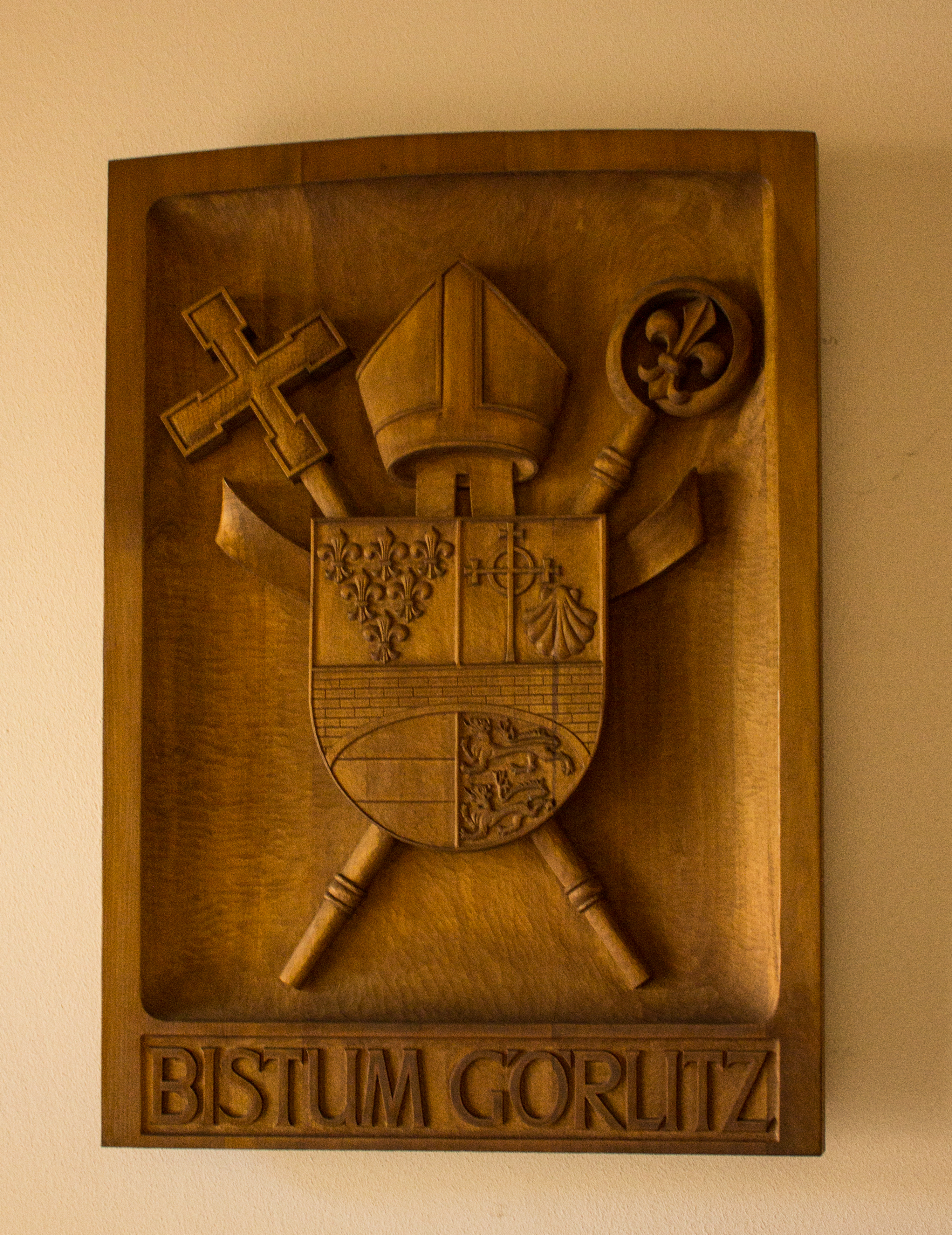 Holzwappen Bistum Görlitz, Bischöfliches Ordinariat, Görlitz